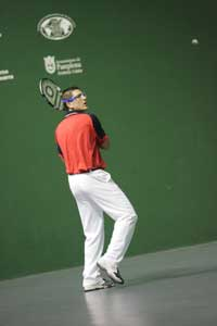 seleccion espñaola